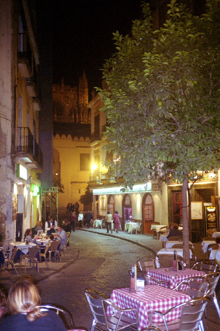 Seville Spaina002_5